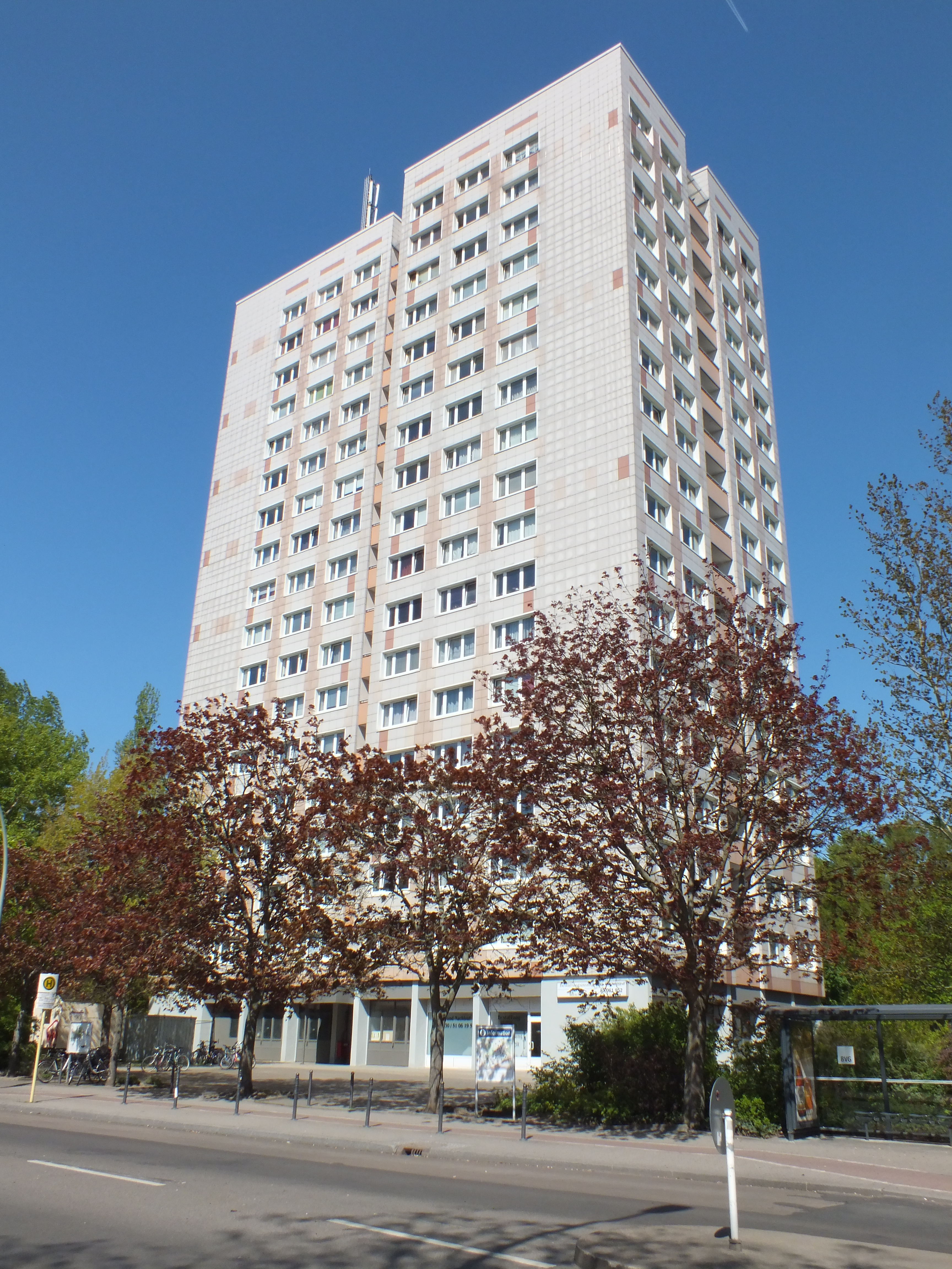 Hochhaus im Bezirk Lichtenberg: Dathepromenade 3, OT Friedrichsfelde